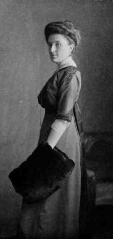 Крупенская Елена Михайловна